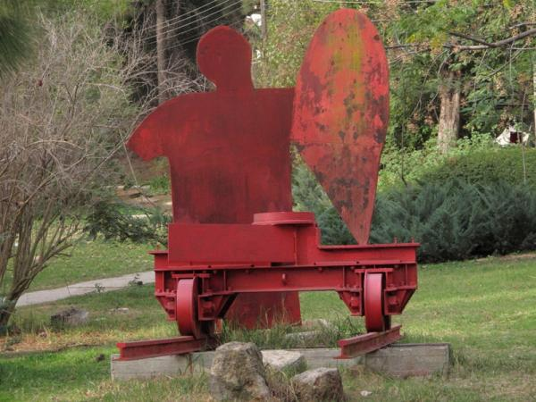 פסל ברזל אדום על מסילות רכבת של יגאל תומרקין בקיבוץ הראל. שם הפסל הכניסיני תחת כנפך.